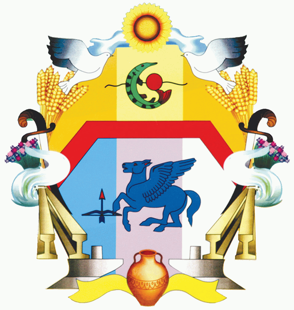 Герб Пологівського району